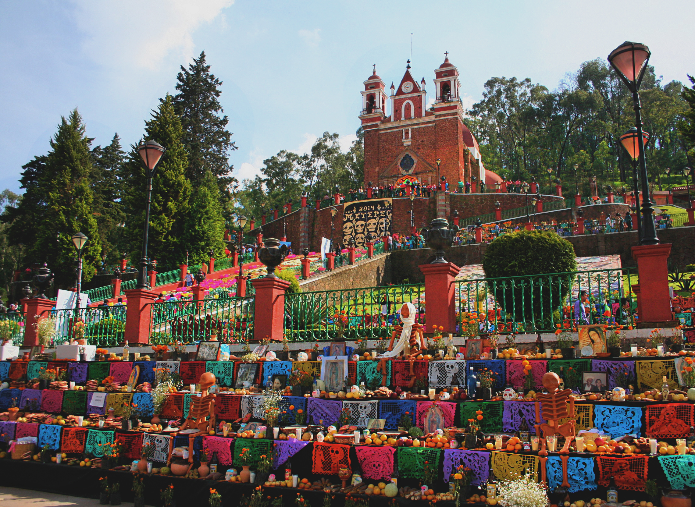 Una vista panorámica de la ofrenda que se montó en el "Calvario de Metepec"